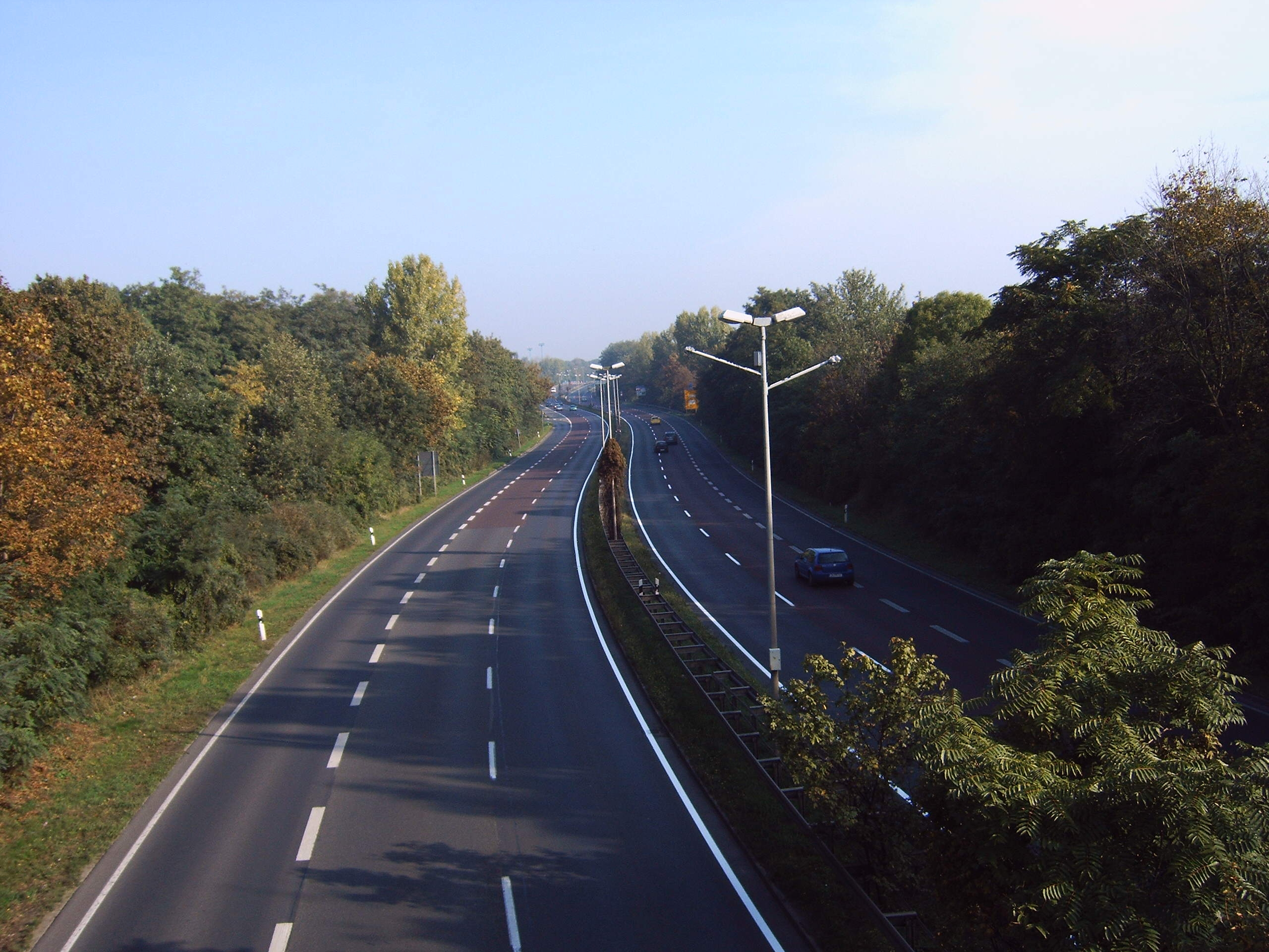 Magdeburger Ring, Stadtautobahn Höhe Brücke Glacis-Anlagen, Bild aufgenommen am 9.10.2005 von Olaf2